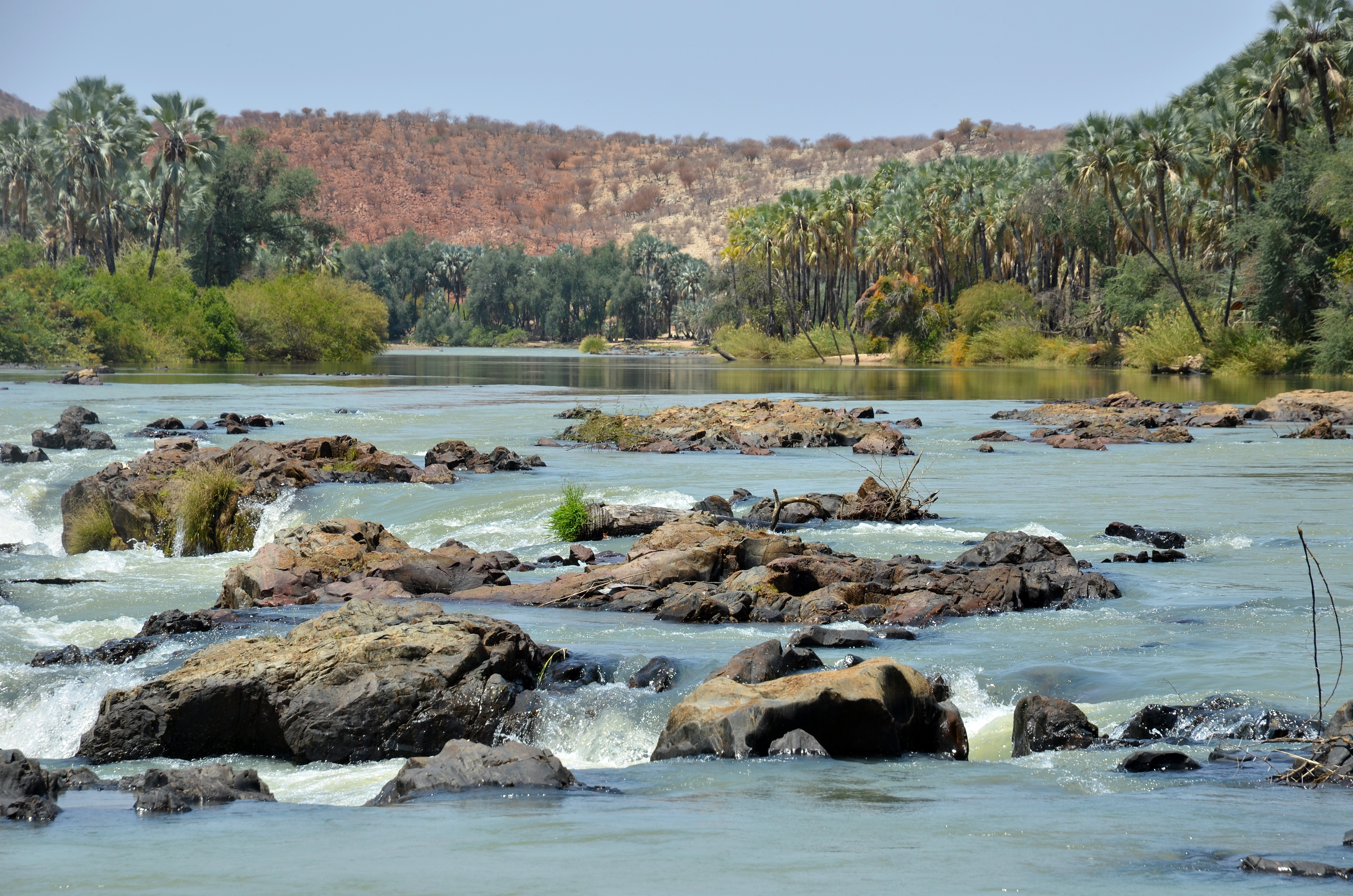 Řeka Kunene River, vodopády Epupa Falls - Namibie, Angola